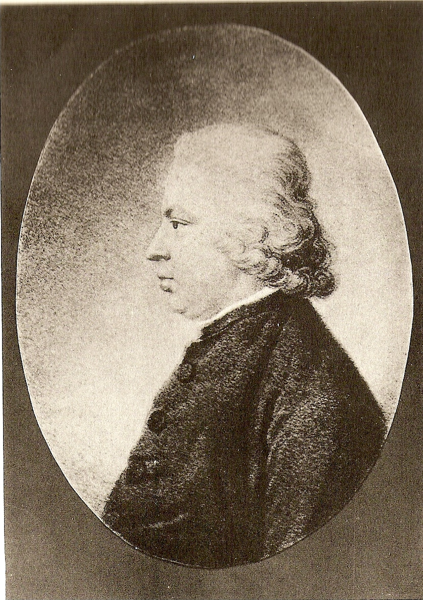 Bildnis des Gottlieb Nicolaus Stolterfoth (1763-1806), Prediger an der Kirche des Burgklosters, Direktor der Gesellschaft zur Beförderung gemeinnütziger Tätigkeit